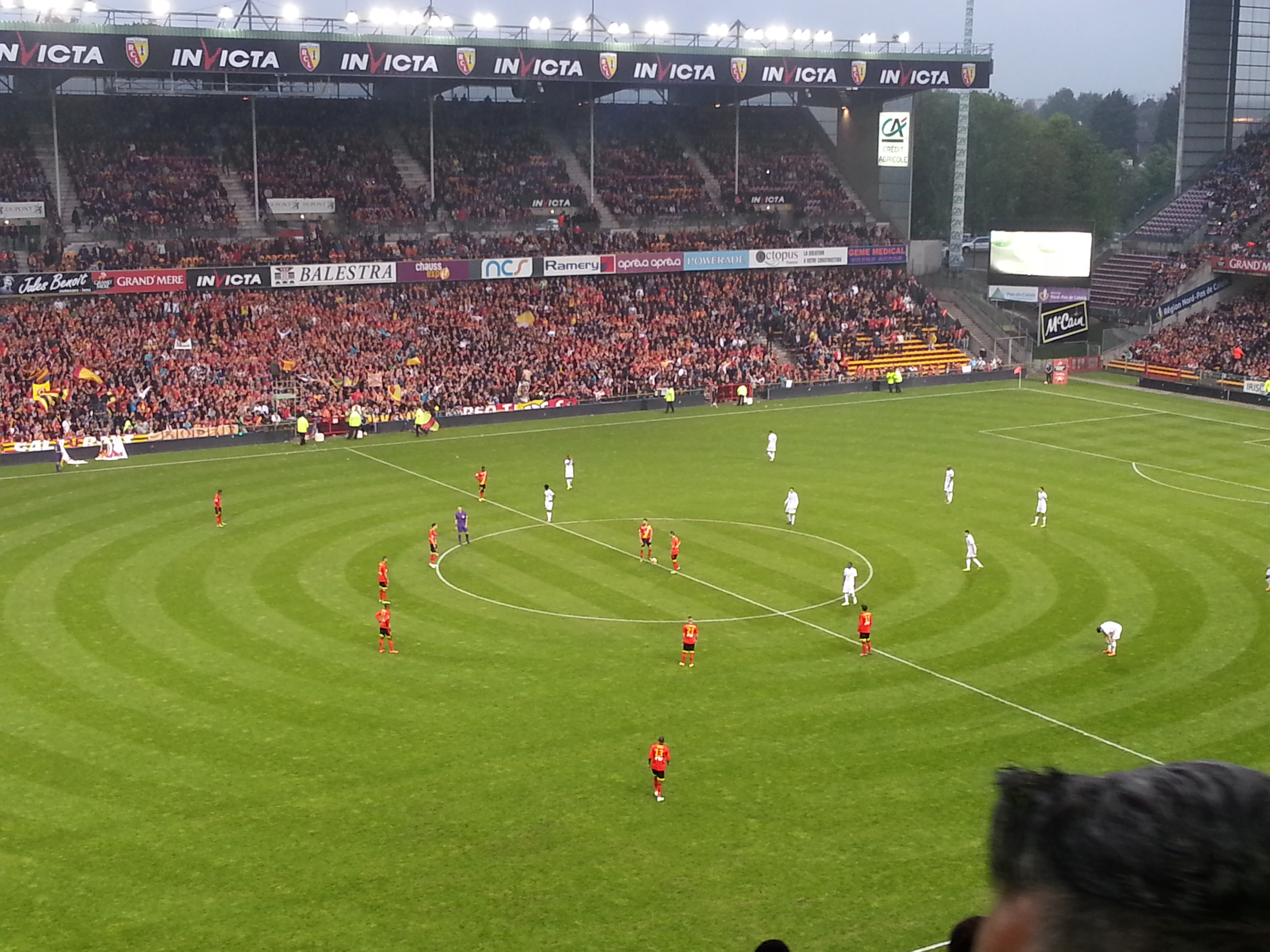 Coup d'envoi entre Lens et Nancy devant 40 035 spectateurs (nouveau record de la saison et du club en Ligue 2)